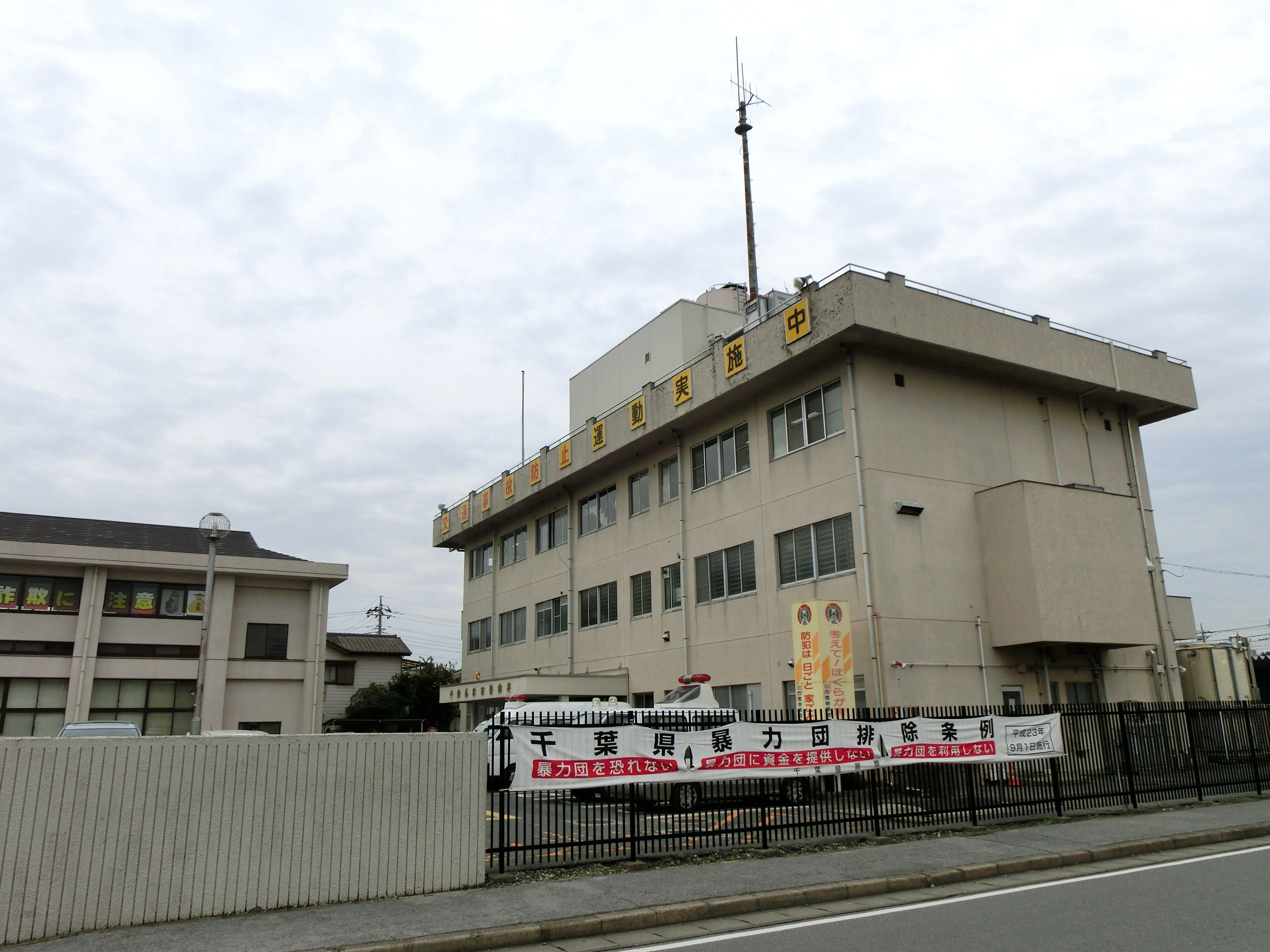 印西警察署